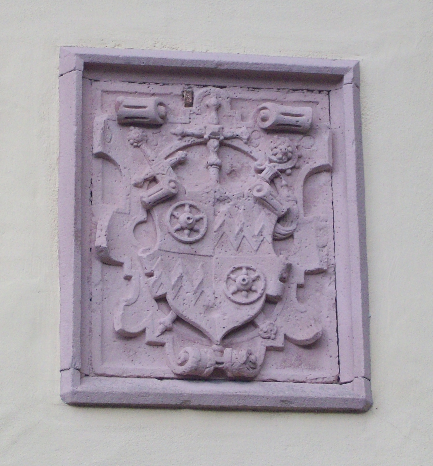 Mainzer Wappen auf der Südseite des Schlosses - Daniel Brendel von Homburg 155-1582